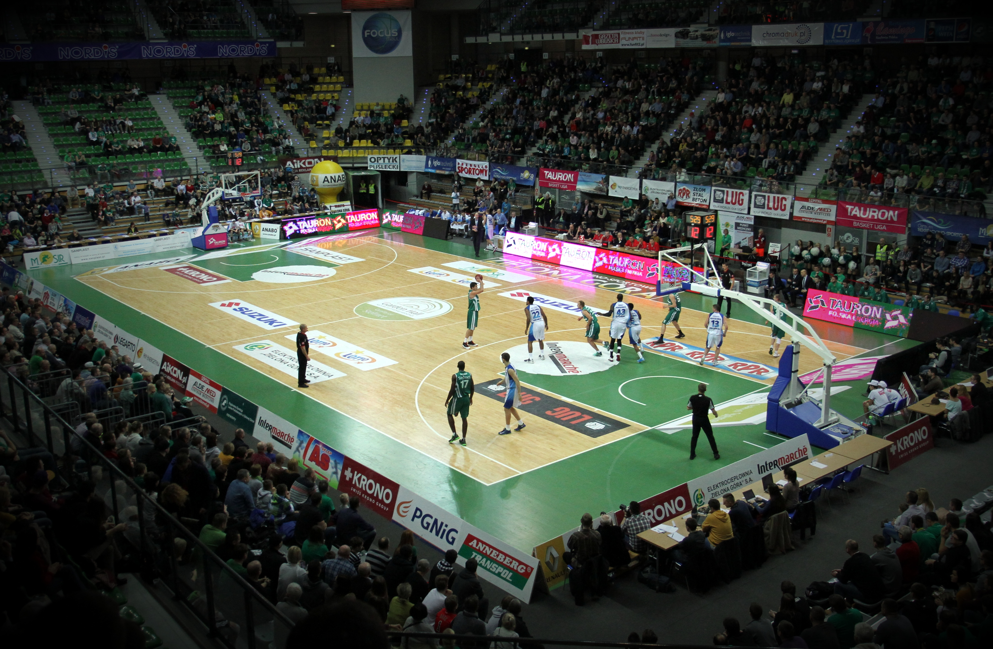 Mecz koszykówki, Tauron Basket Liga, Stelmet Zielona Góra